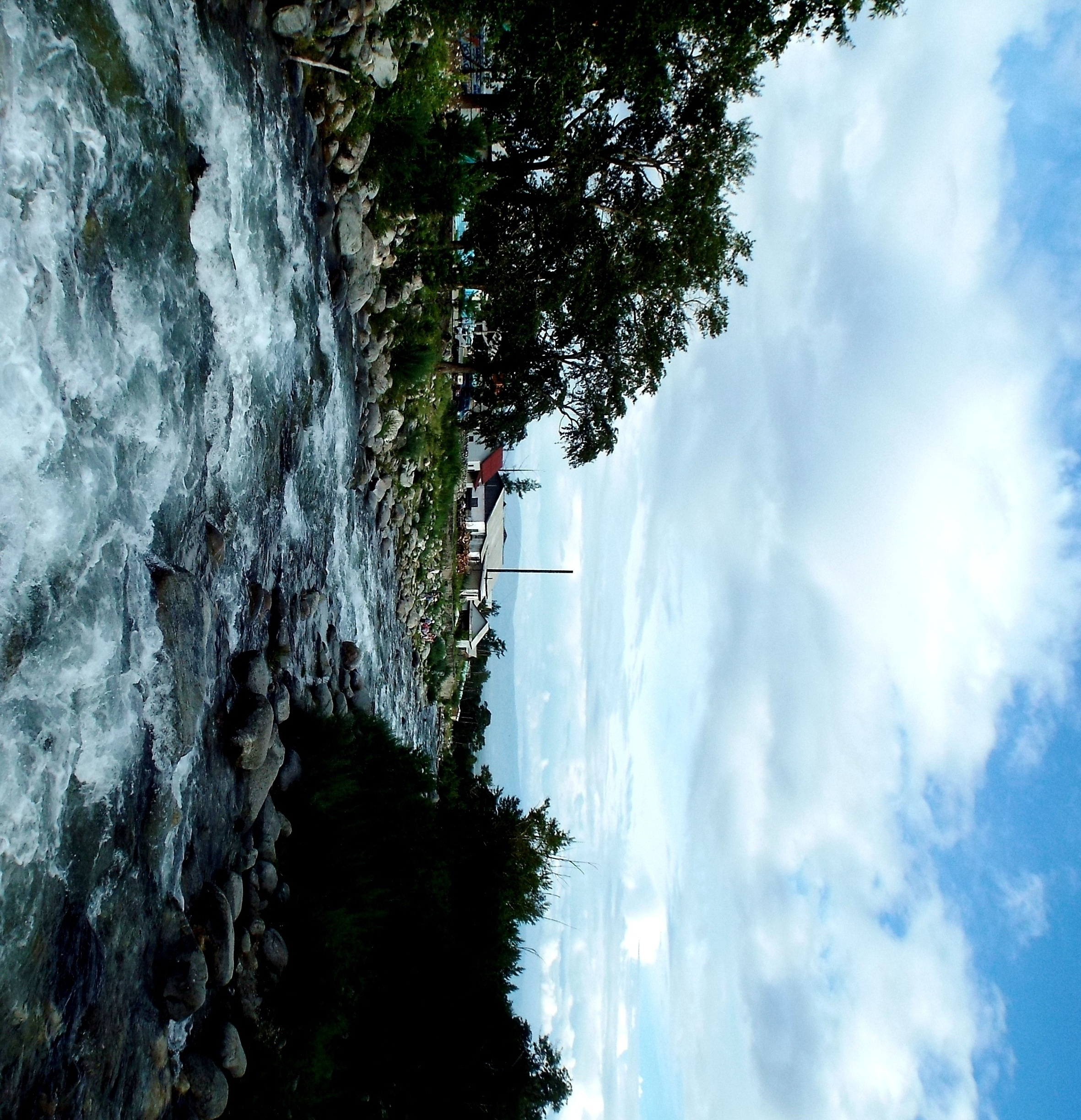 Аршан, Тункинский район This image is related to the protected area of Russia number 0310113